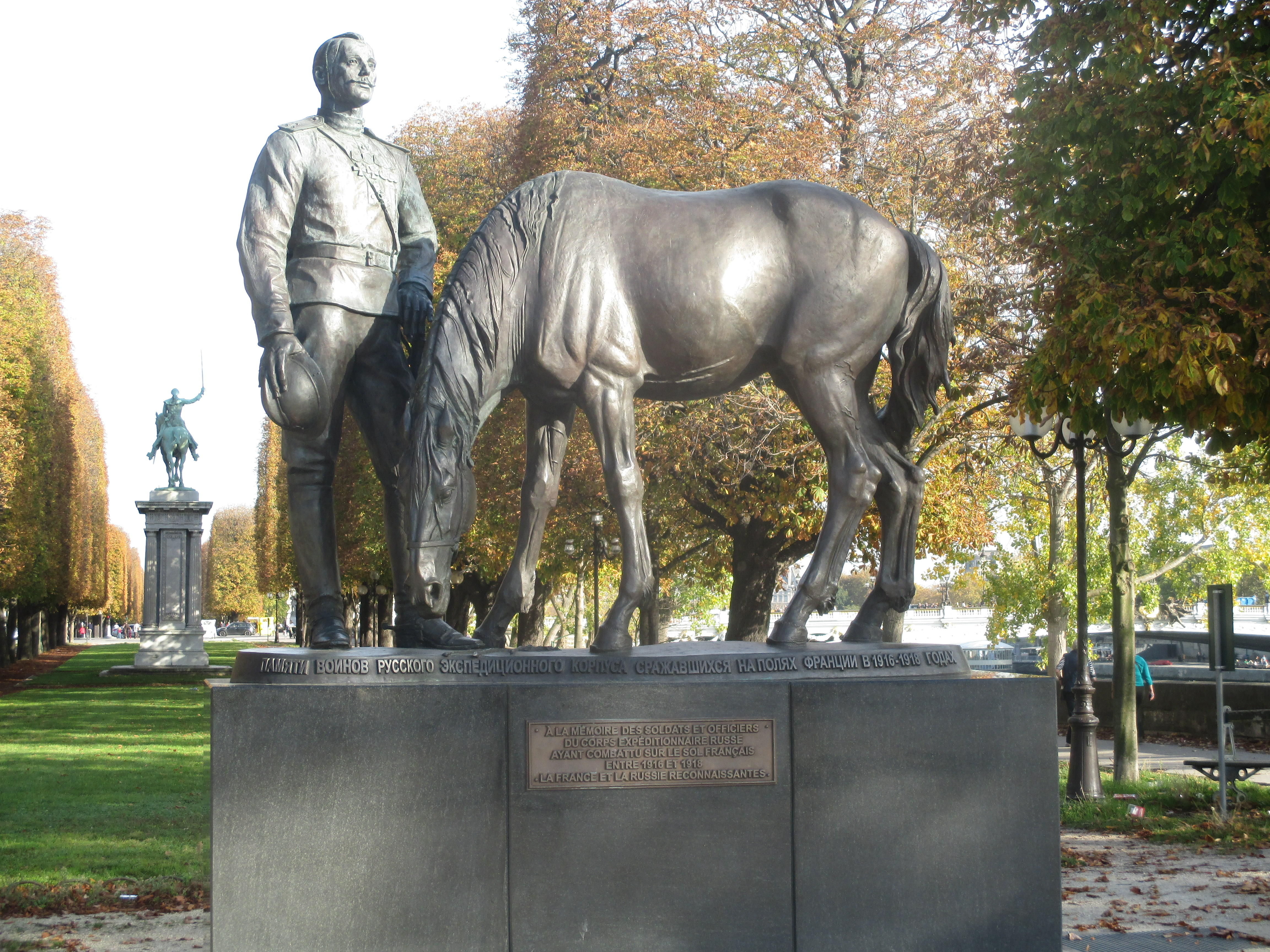 Monument du corps expéditionnaire russe, inauguré le 21 juin 2011 par François Fillon et Vladimir Poutine, à l'angle de la place du Canada et du cours la Reine à Paris, le long de la Seine.